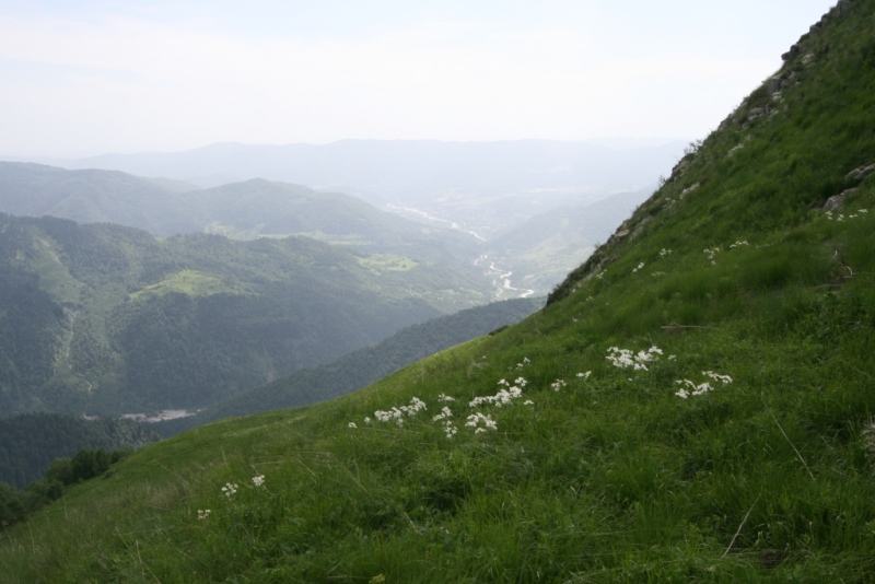 Вид на ущелье Большой Лиахвы с Галуаны рагъ над с.Кусджыта, Джавский р-н РЮО